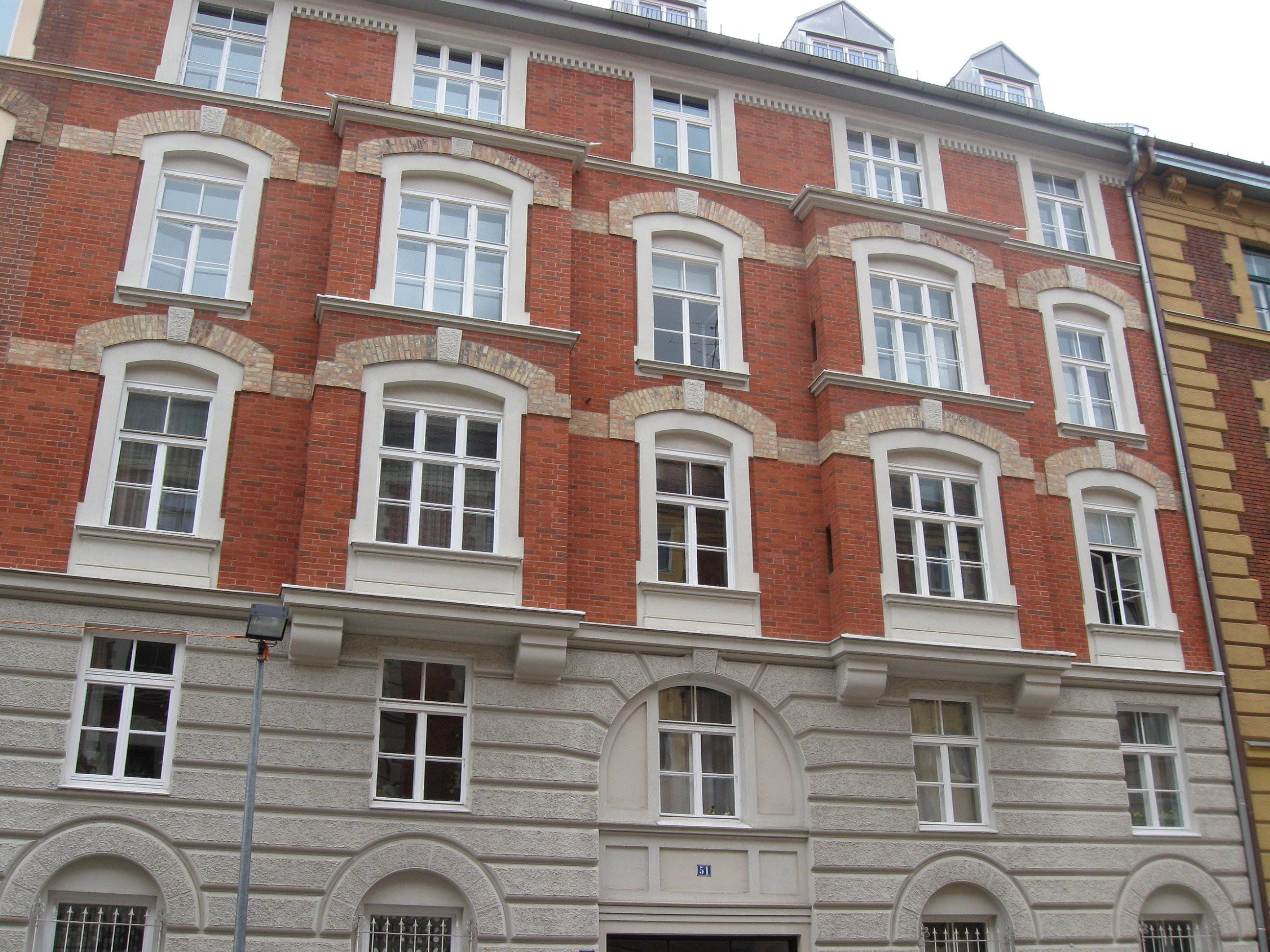 Adalbertstraße 51; Mietshaus mit Doppelerkerfassade, Neurenaissance, um 1899 von Johann Widmann; vgl. Nr. 49 und 64.